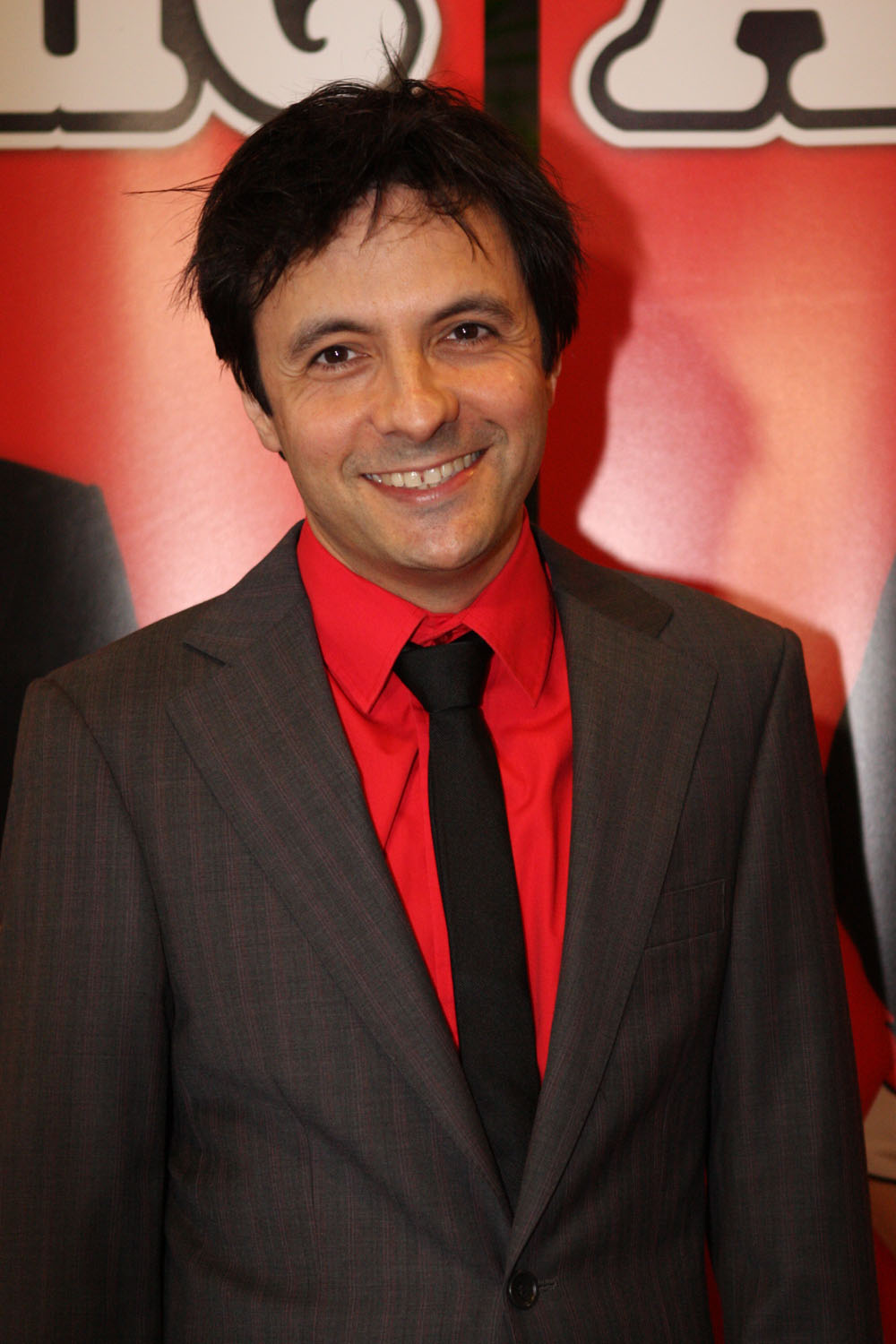 John Foreman